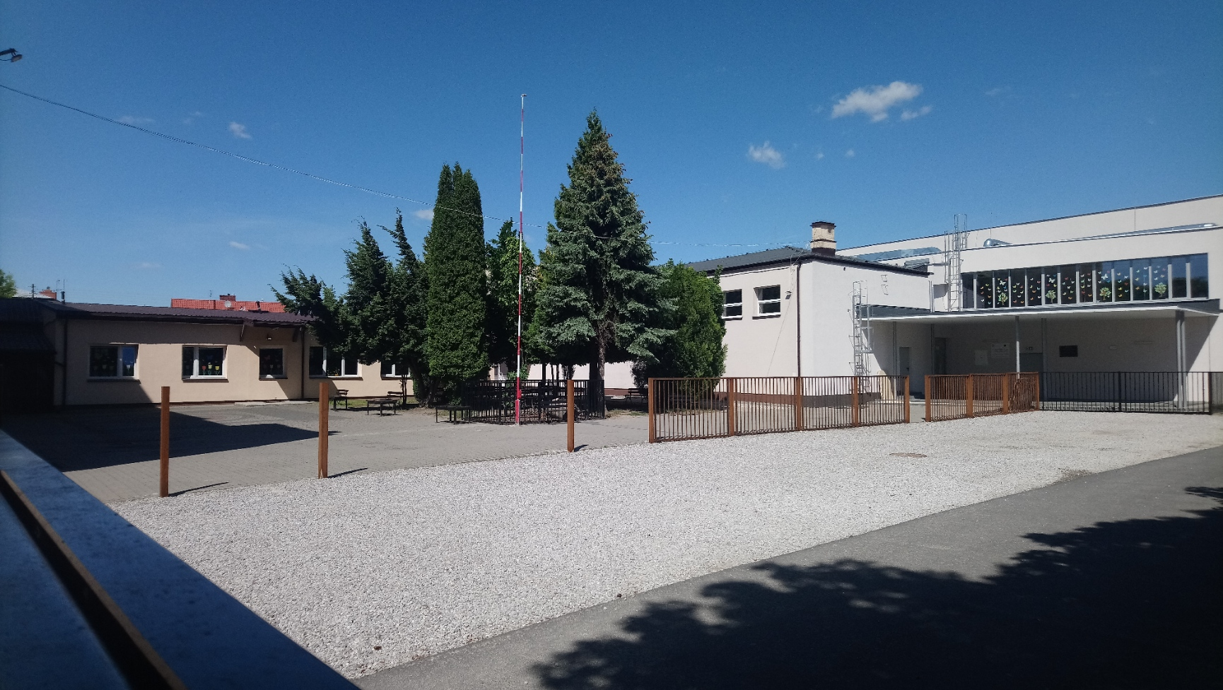 dziedziniec szkolny dziś